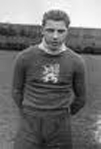 Čestmír Patzel (1914-2004), český fotbalový brankář německé národnosti